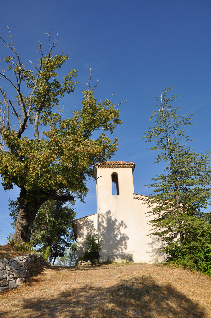 Chapelle à Montpezat